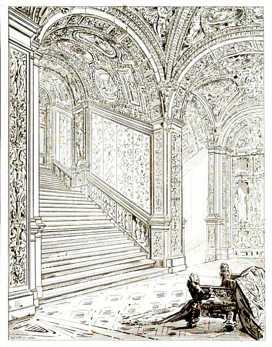 Incisione tratta da: "Il Palazzo Ducale di Venezia illustrato da Francesco Zanotto, con incisioni, Venezia 1841"